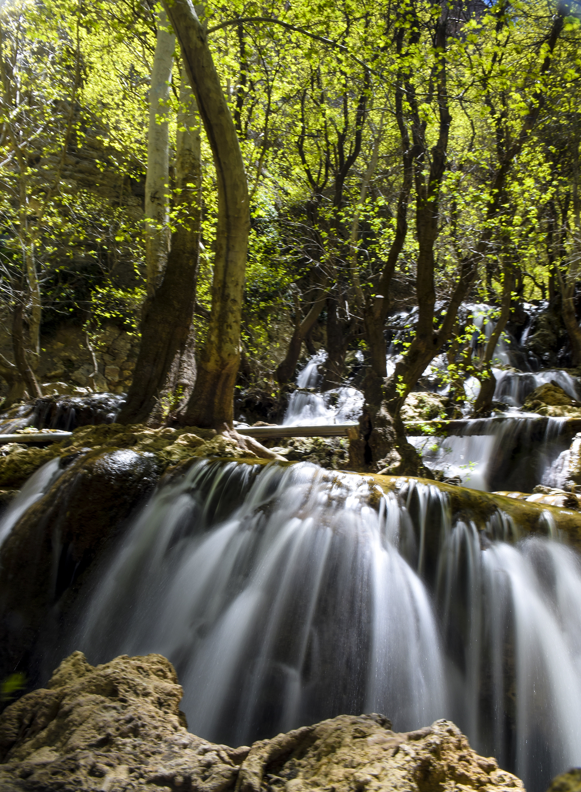 تنگ بستانک با مساحت ۱۵۳۲۴ هکتار در شمال غربی استان فارس و در فاصله ۱۲۰ کیلومتری شهر شیرازودرفاصله ۱۰۰کیلومتری شهرمرودشت در بخش کامفیروز از توابع شهرستان مرودشت واقع گردیده است.